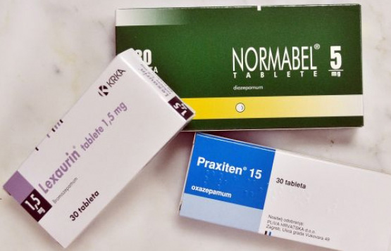 Primjer anksiolitika iz skupine benzodiazepina.